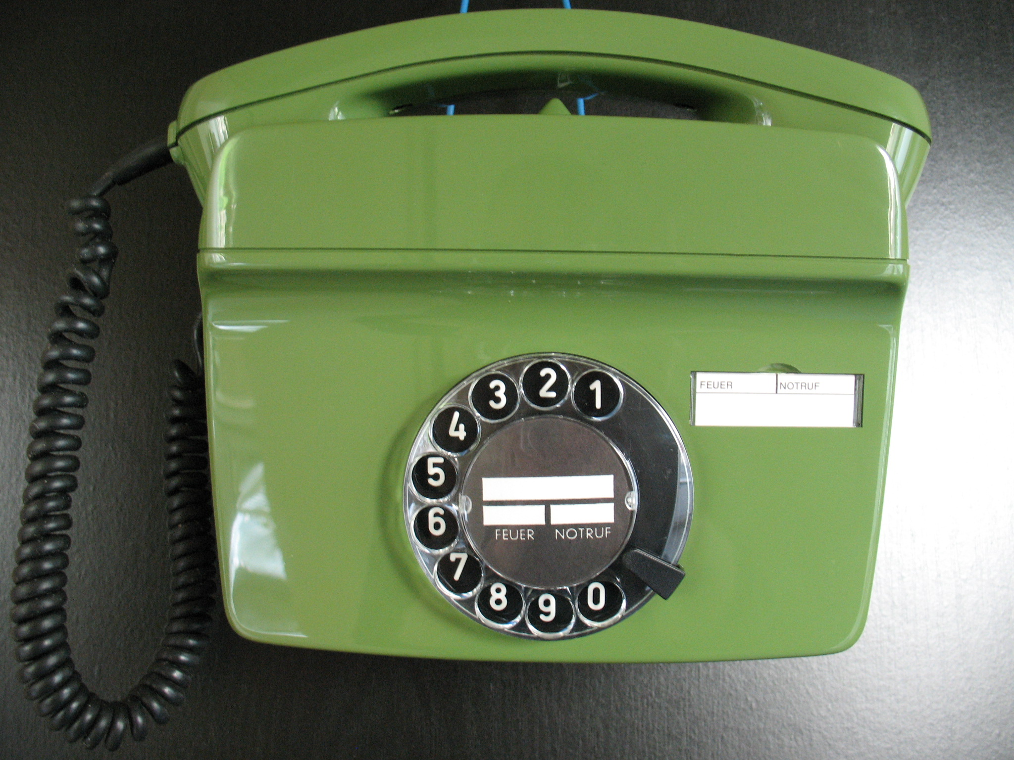 Post Wandtelefon „FeWAp 791“ farngrün - Wählscheibentelefon von 1984